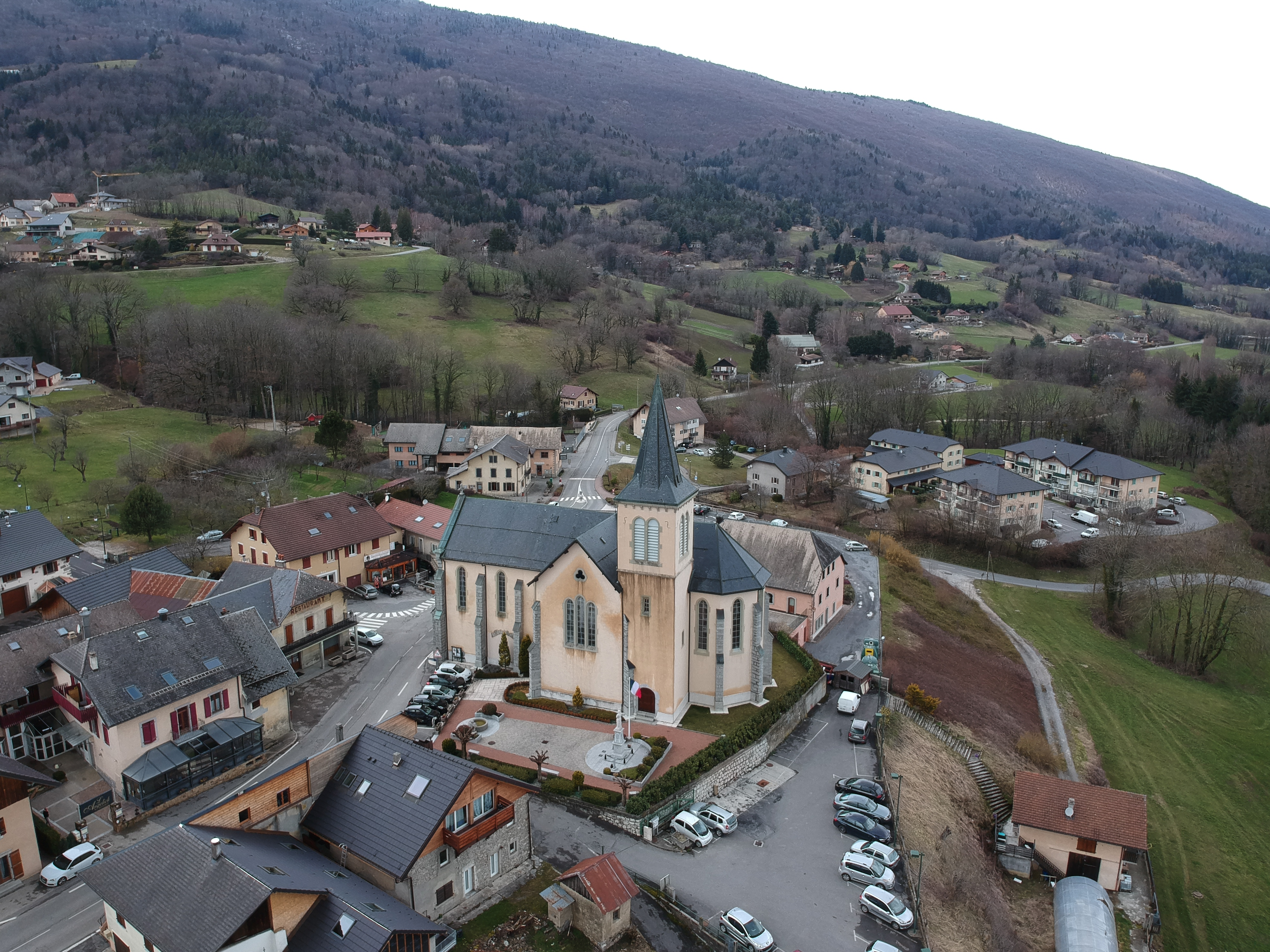 La Muraz